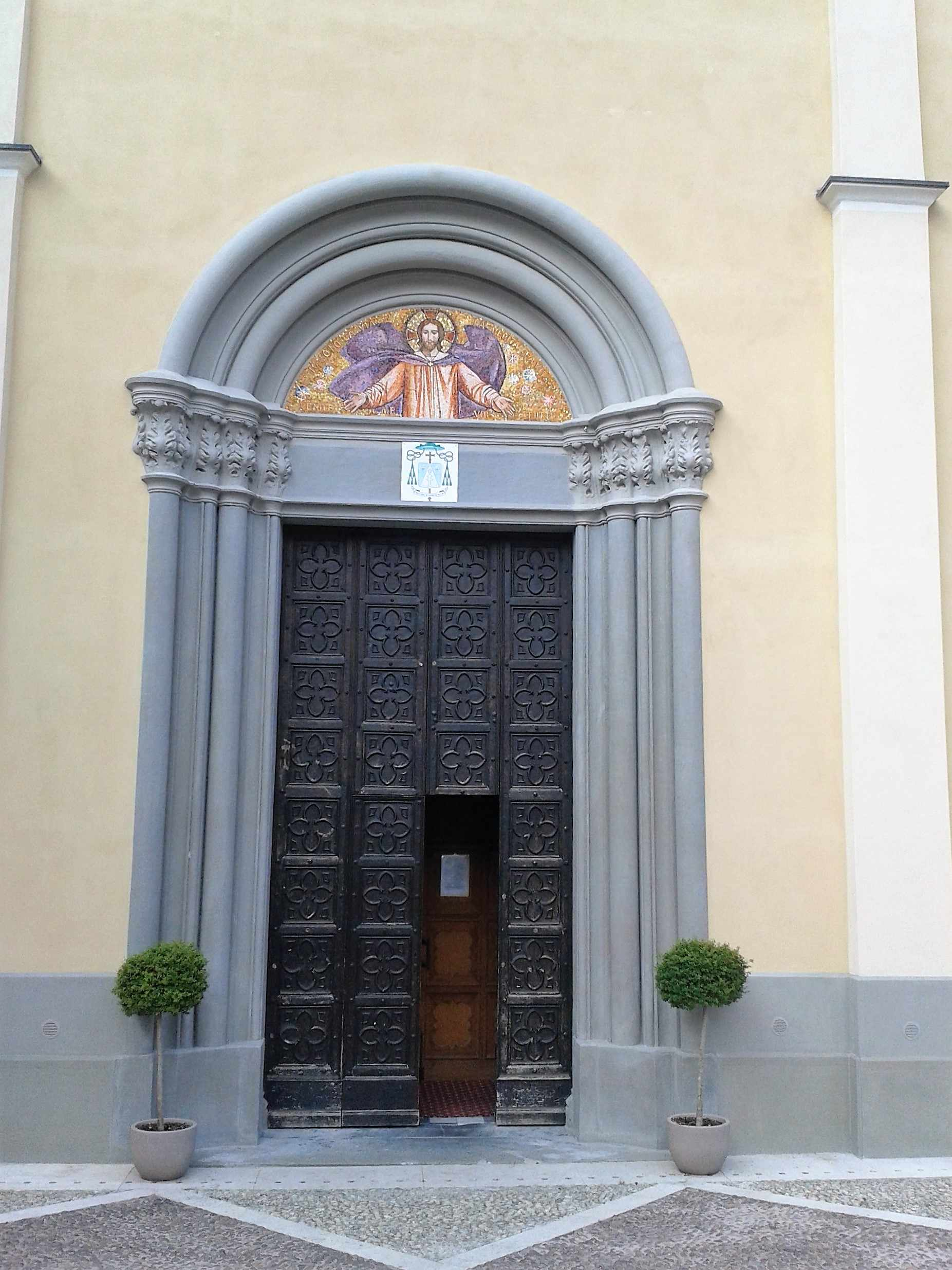 Fonteno ingresso principale della chiesa parrocchiale